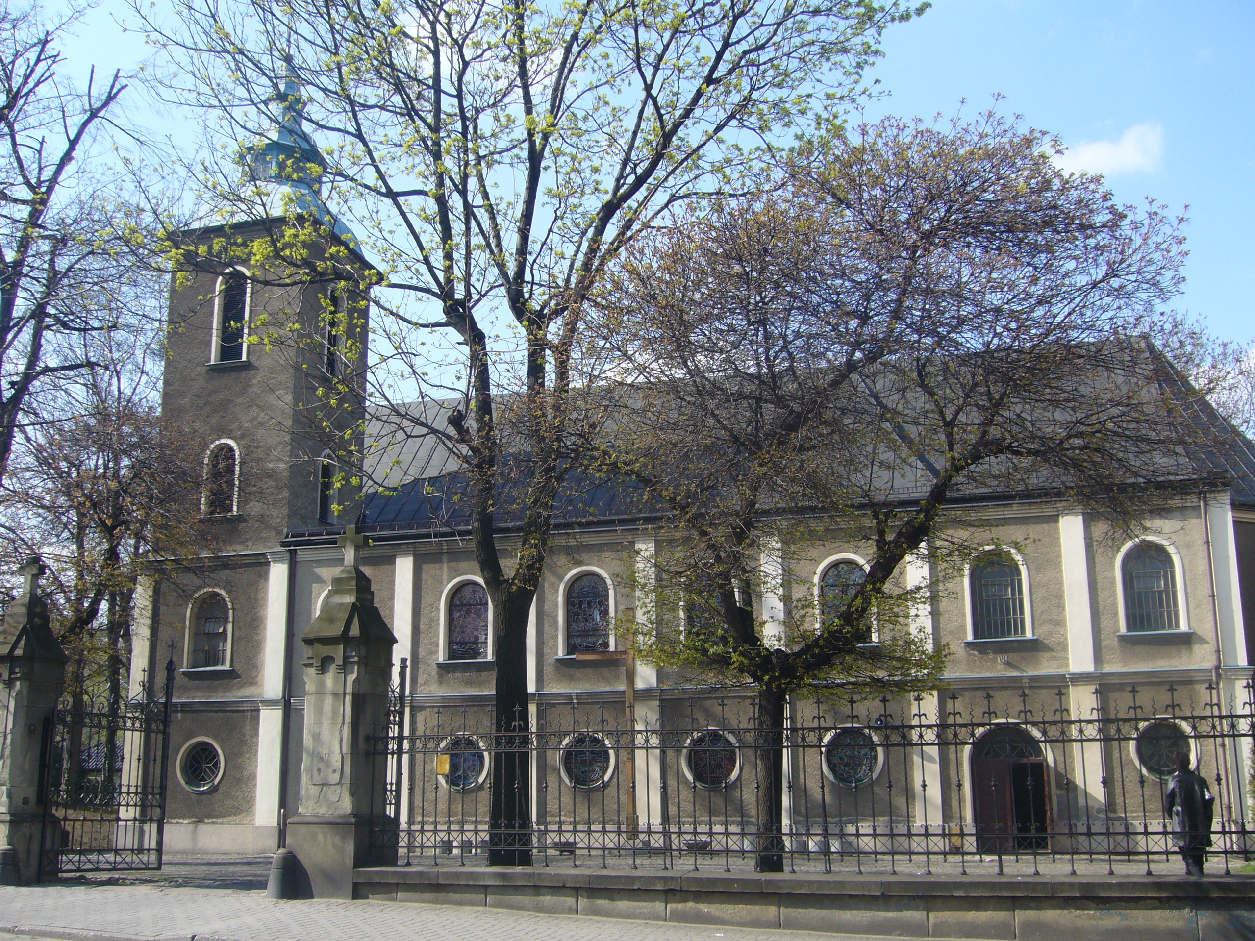 Kościół garnizonowy św. Trójcy w Bielsku-Białej